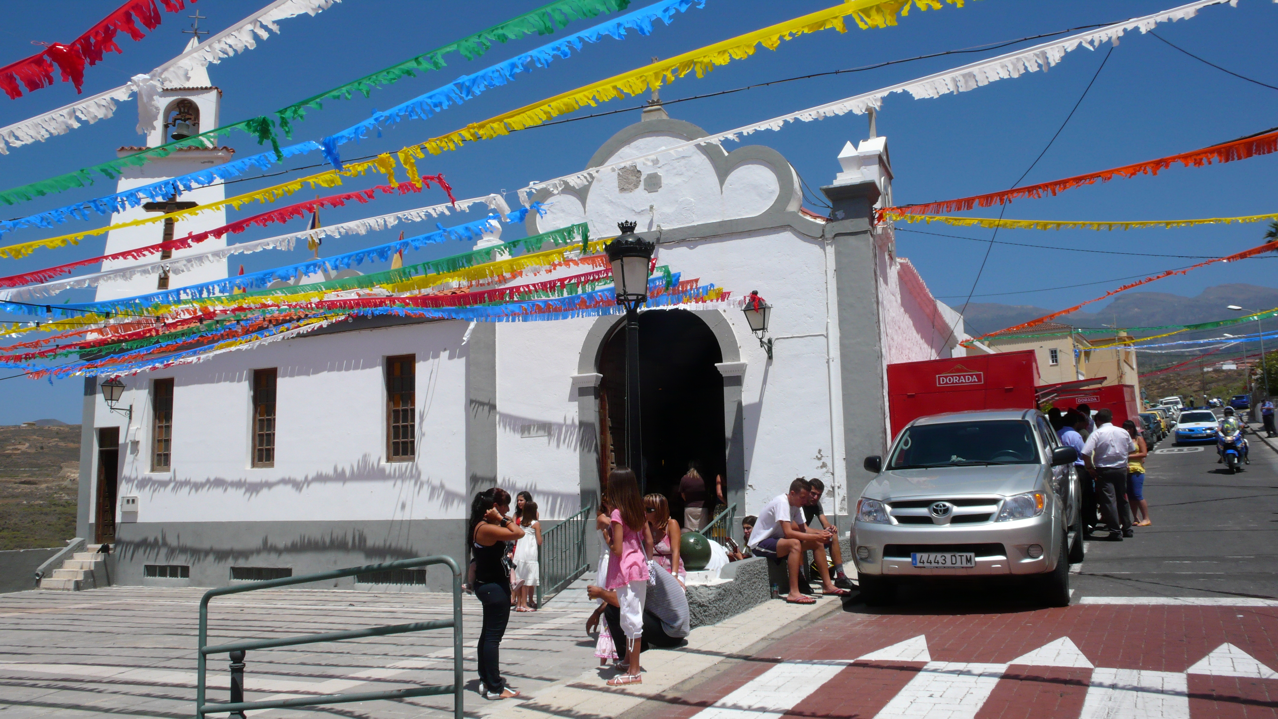 Iglesia de Nuestra Señora del Carmen en Chimiche (Granadilla de Abona) durante sus fiestas en 2008